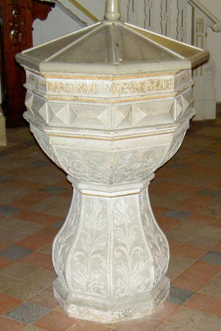 Dorfkirche in Groß Rosenburg